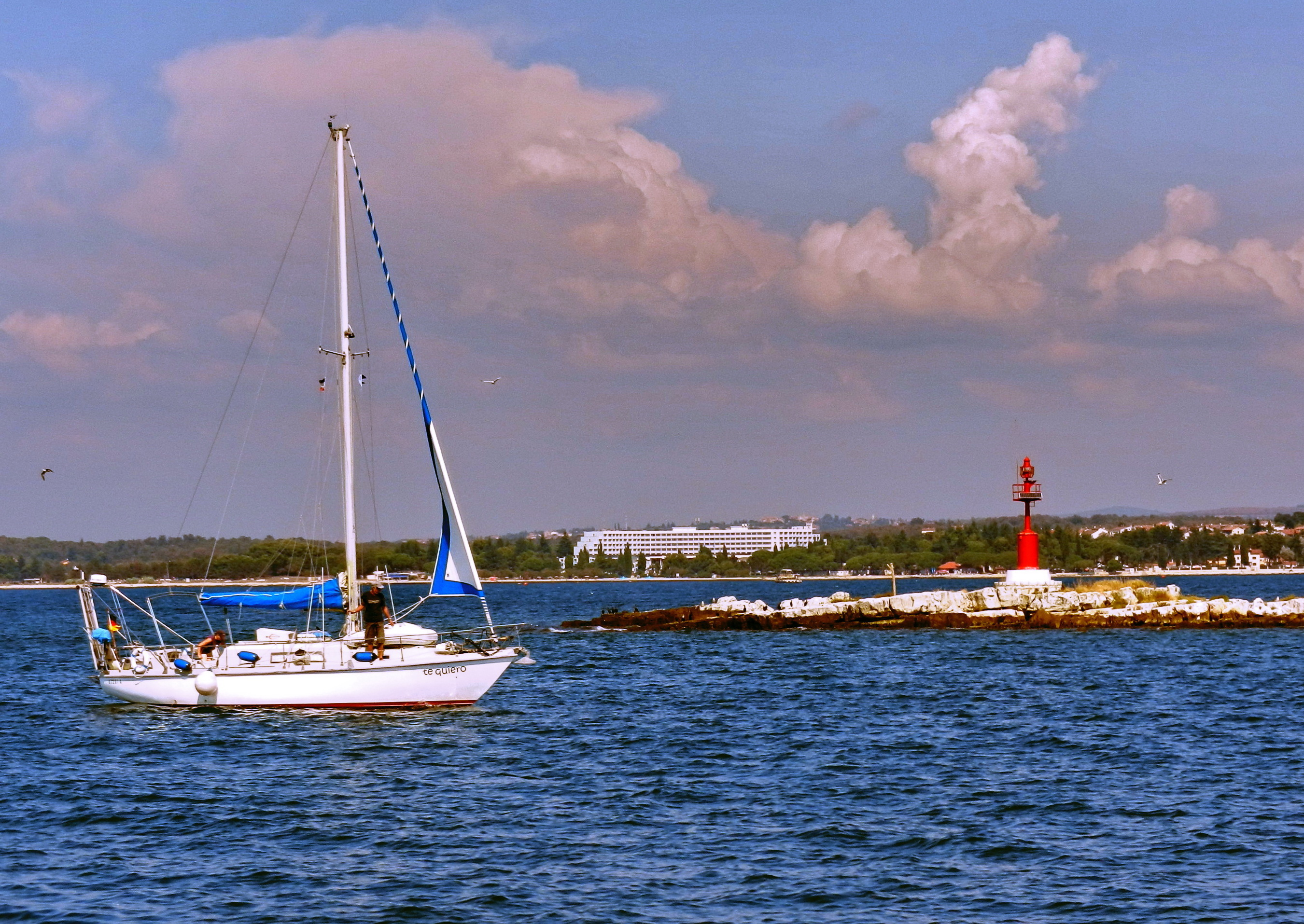 Sv Nicola Porec